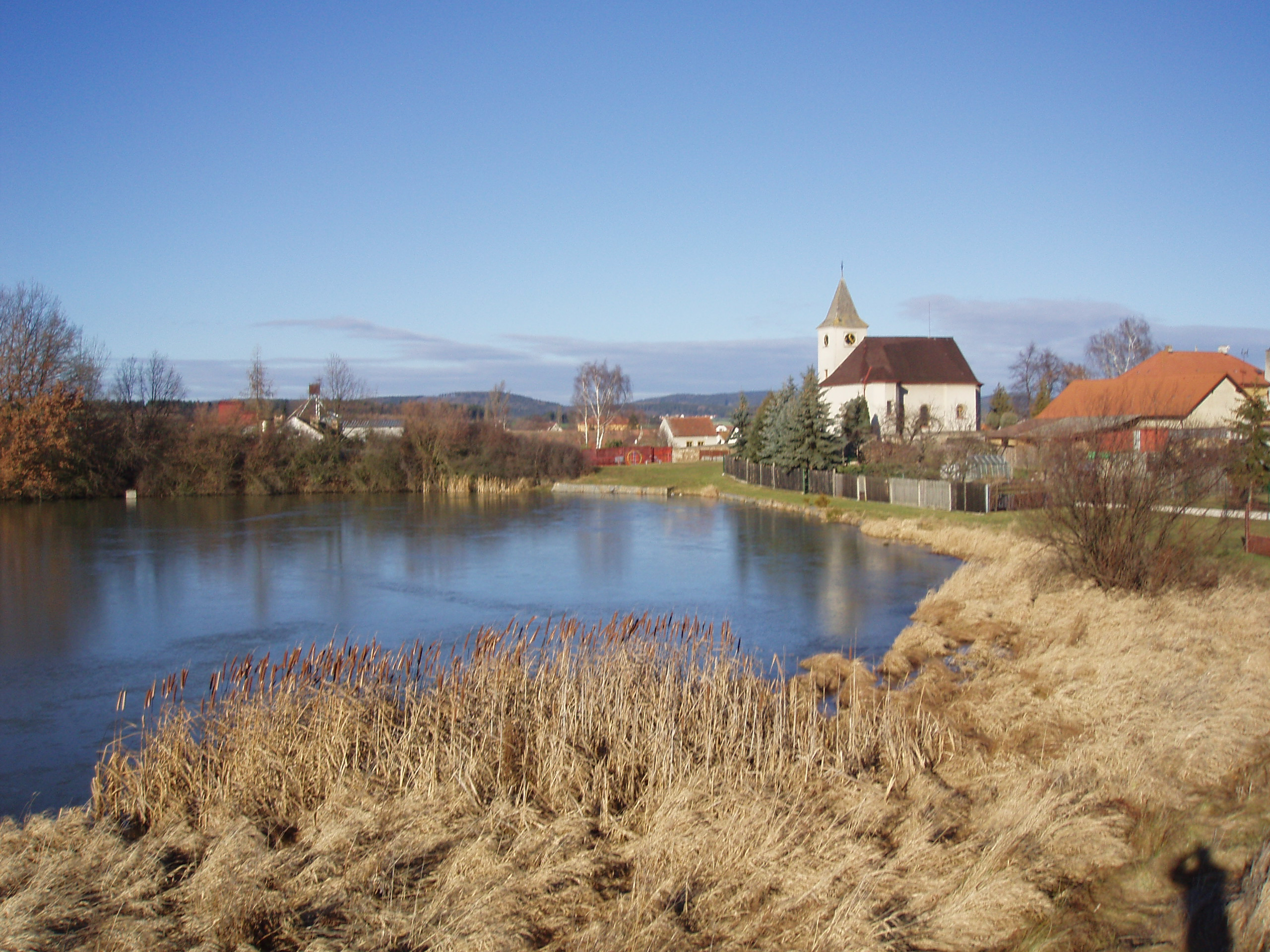 Suchodol - kostel Sv.Lukáše Evangelisty